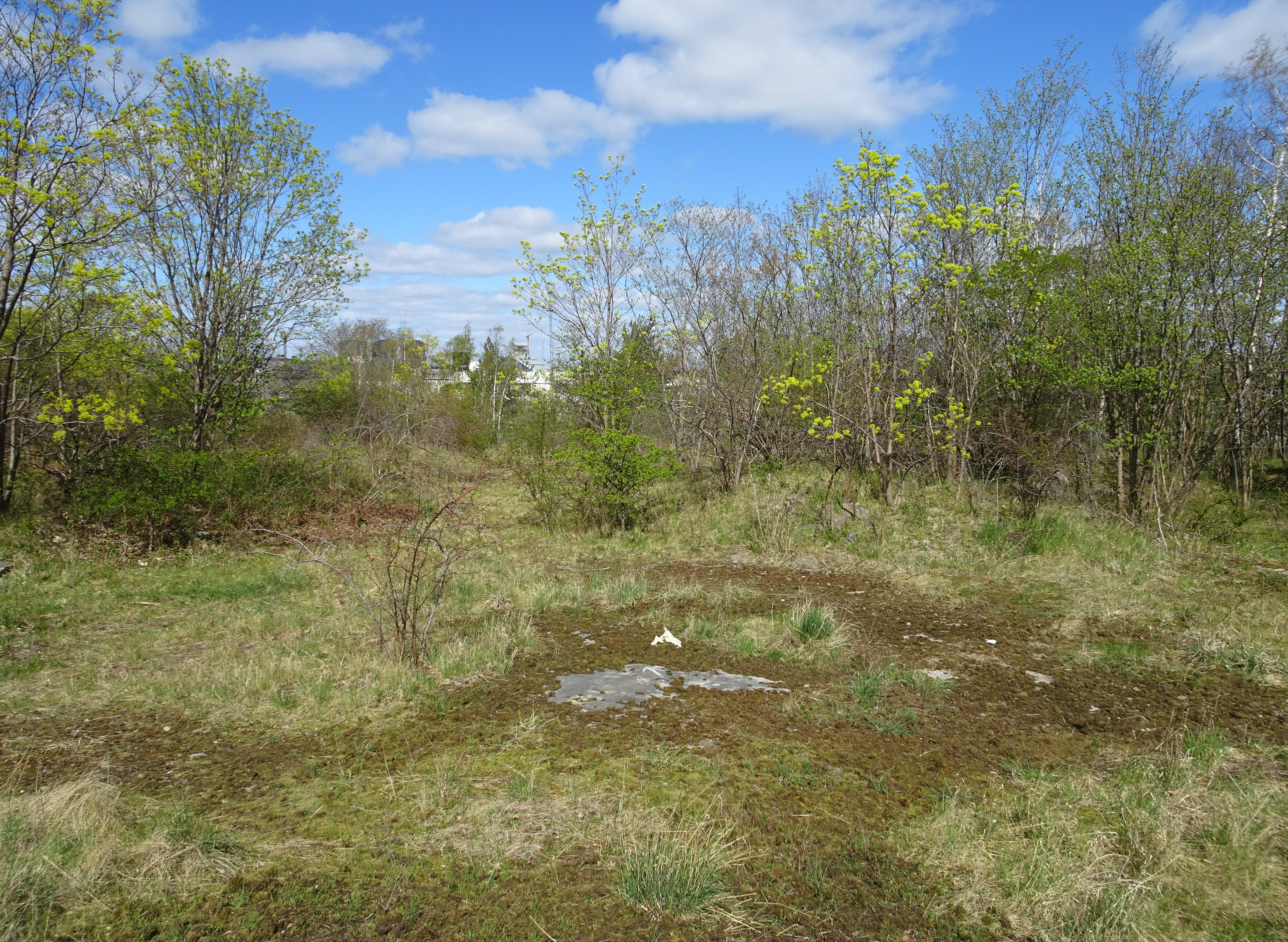 Ersta bytomt